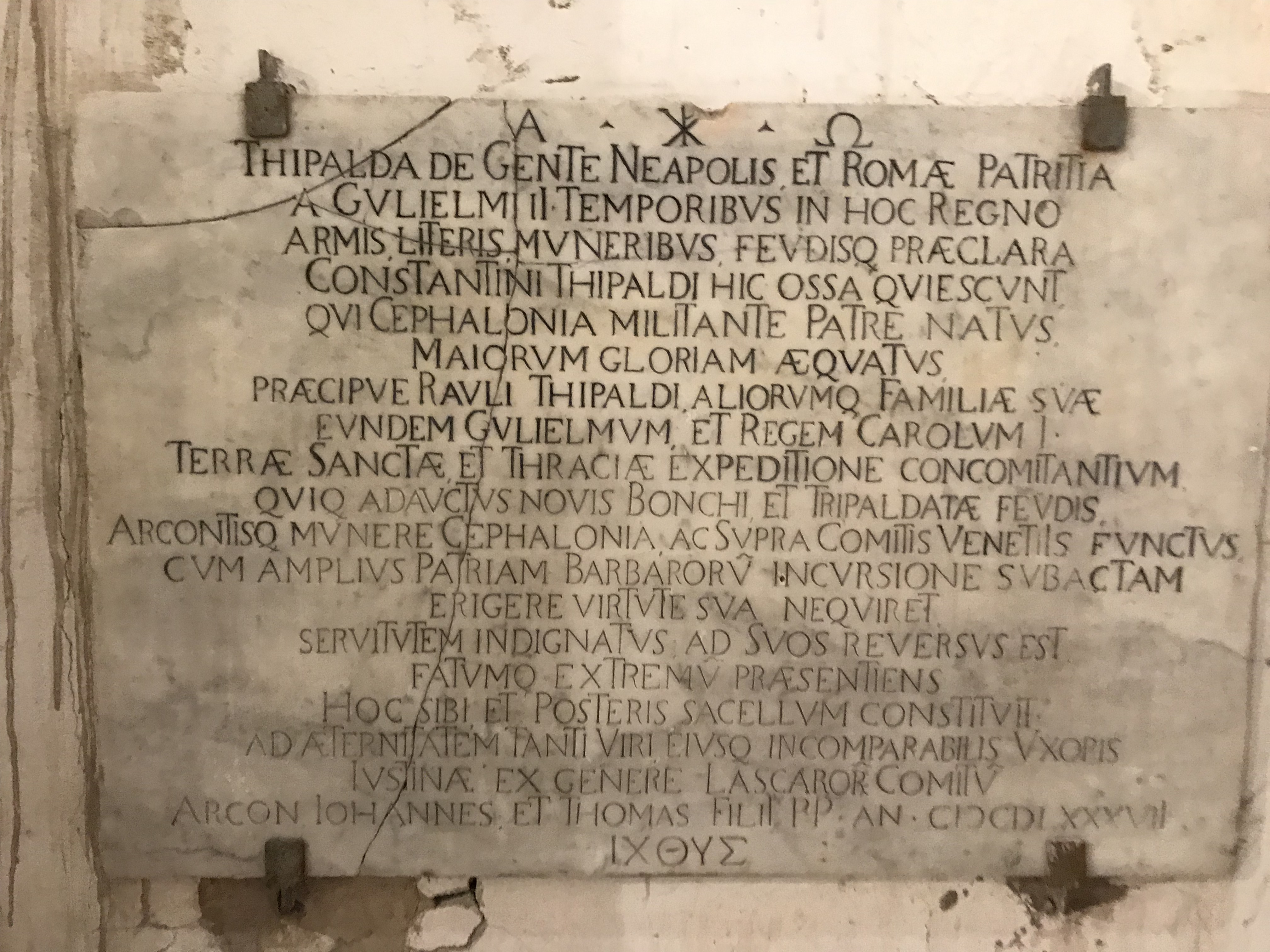 Testimonianza dell'invio dei Tipaldi a Cefalonia presso la La chiesa di Sant'Agnello Maggiore, detta anche Sant'Aniello a Caponapoli.